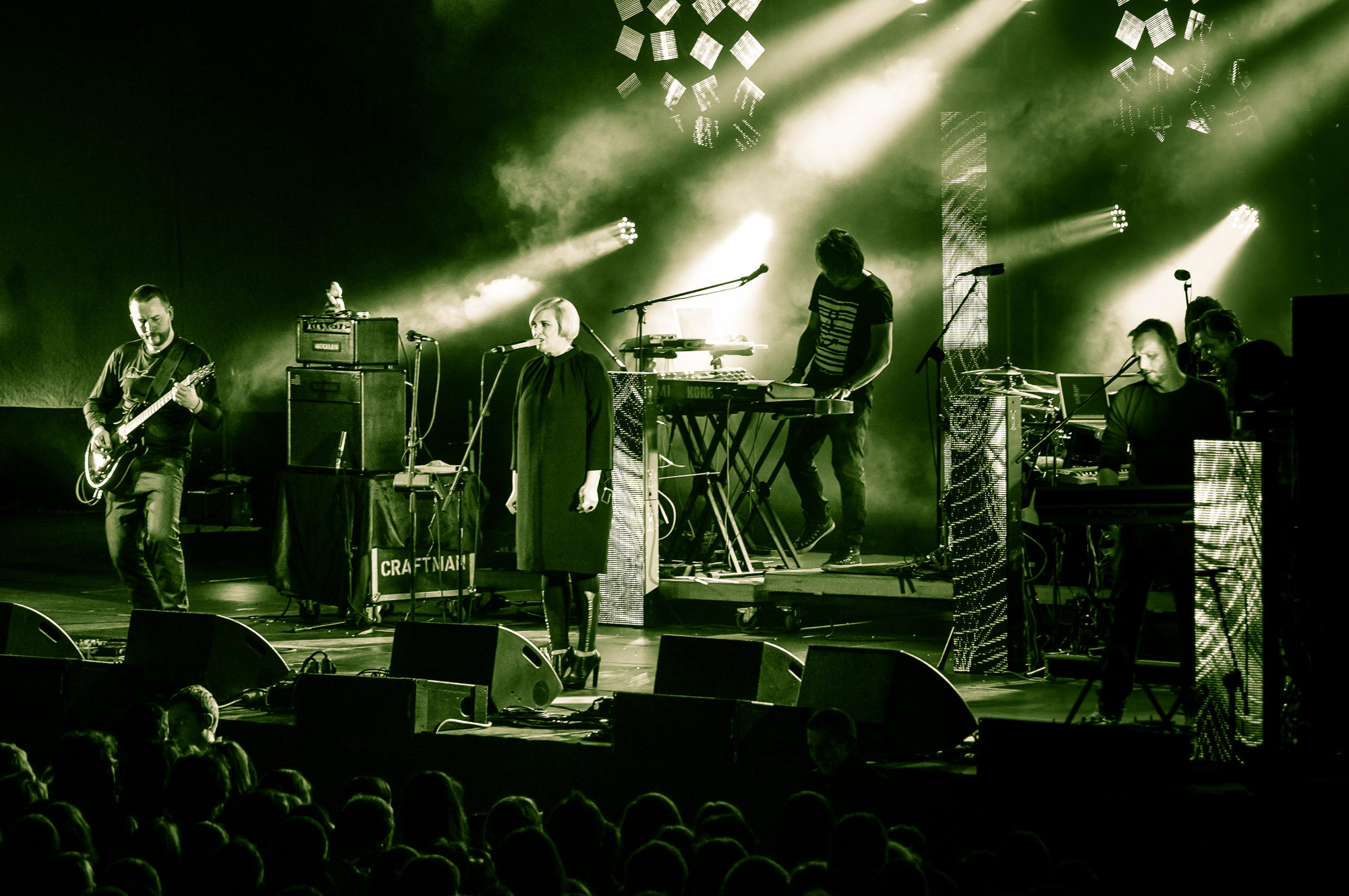 Zespół Hey podczas Rocket Festiwal 2013 w Warszawie.